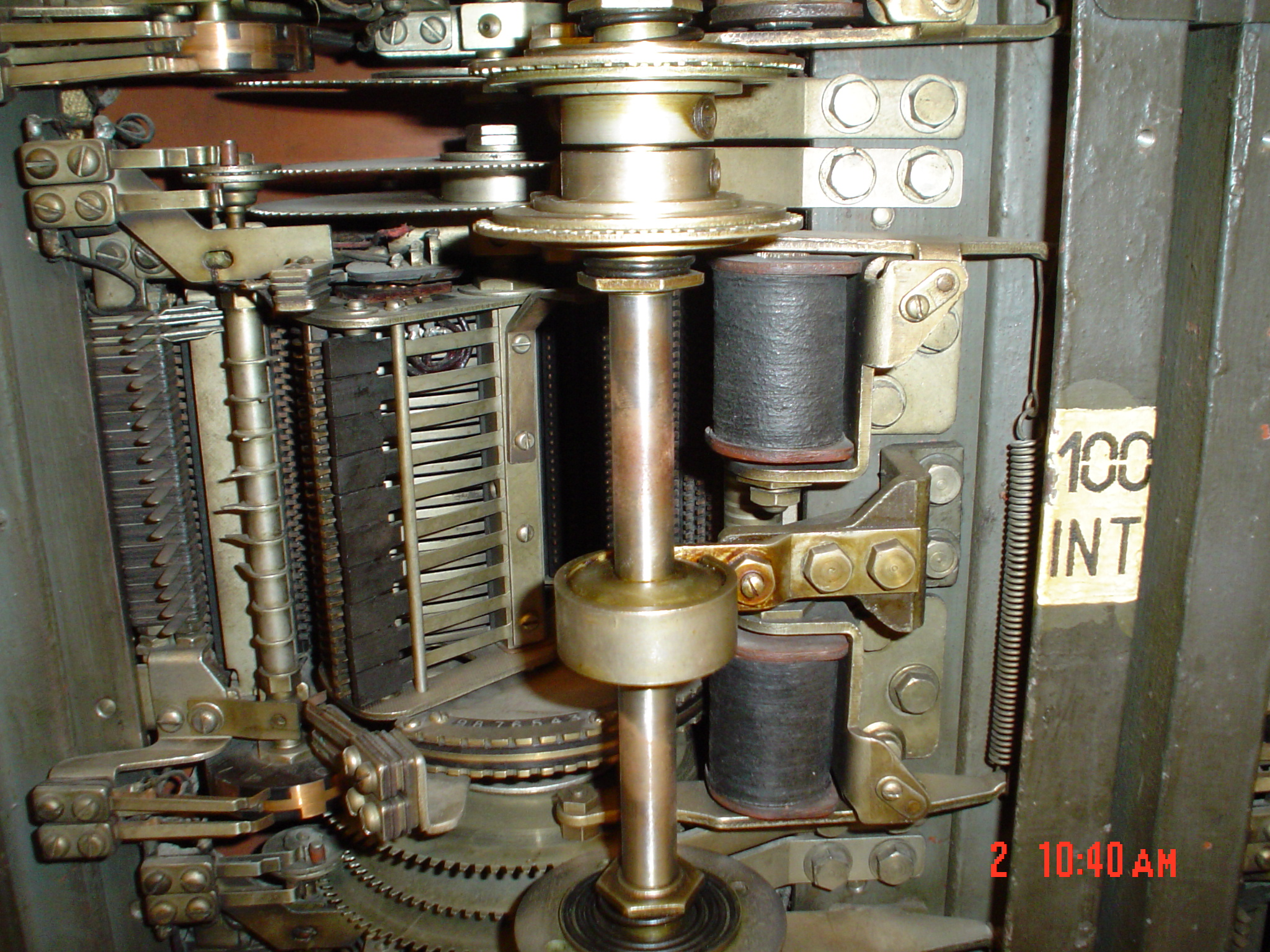 Western-tipa pera maŝino por selektadi.